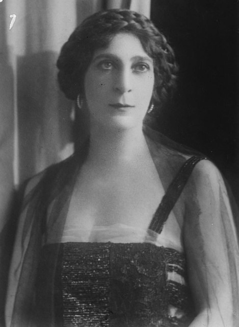 Юрьевская, Екатерина Александровна (1878—1959) — дочь Александра II. Замужем: с 1901 года — за князем Александром Владимировичем Барятинским (1870—1910); в 1916—1924 годах — за князем Сергеем Оболенским (1890—1978).